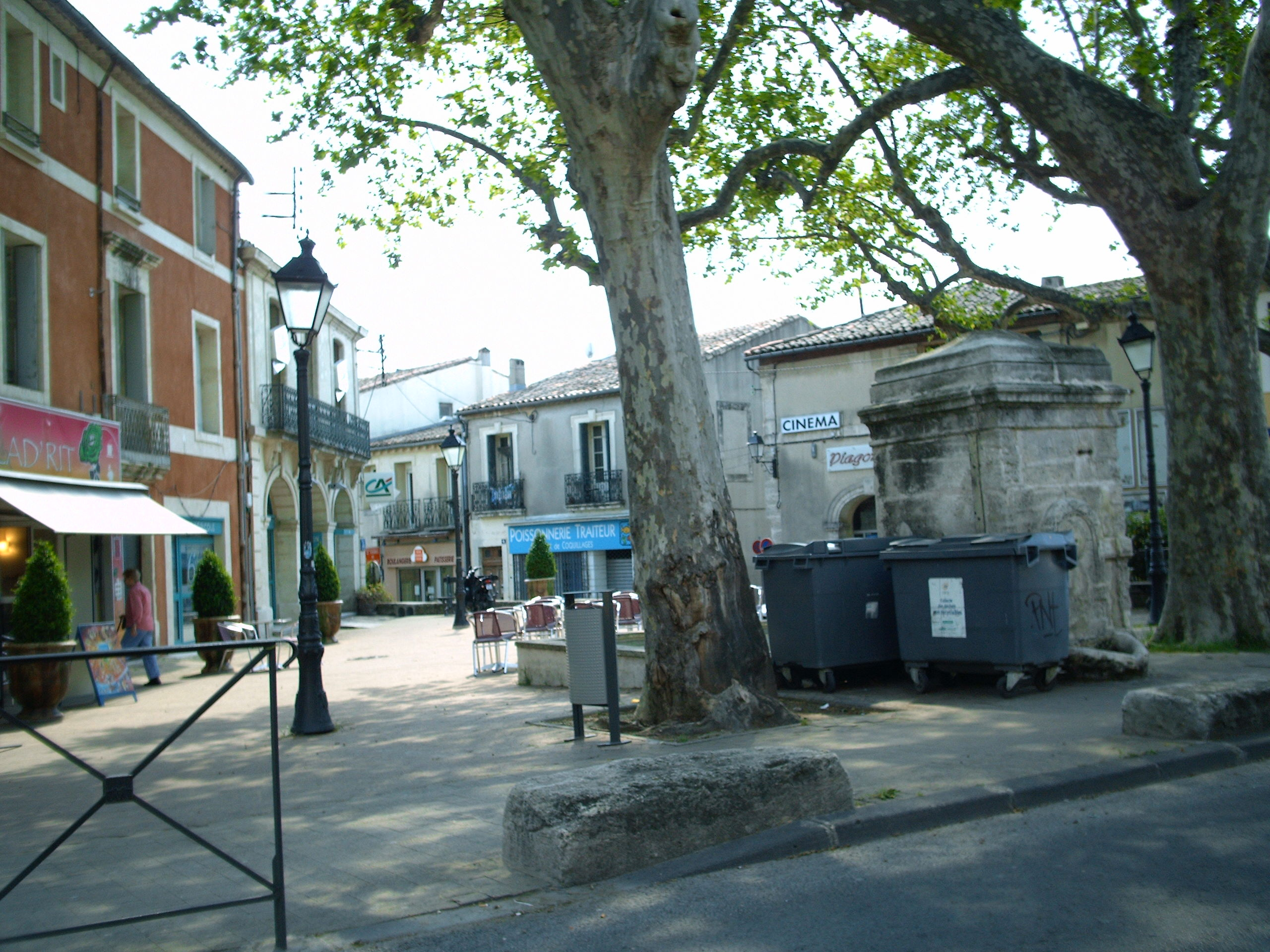 Place Pierre Renaudel à Celleneuve (Montpellier)